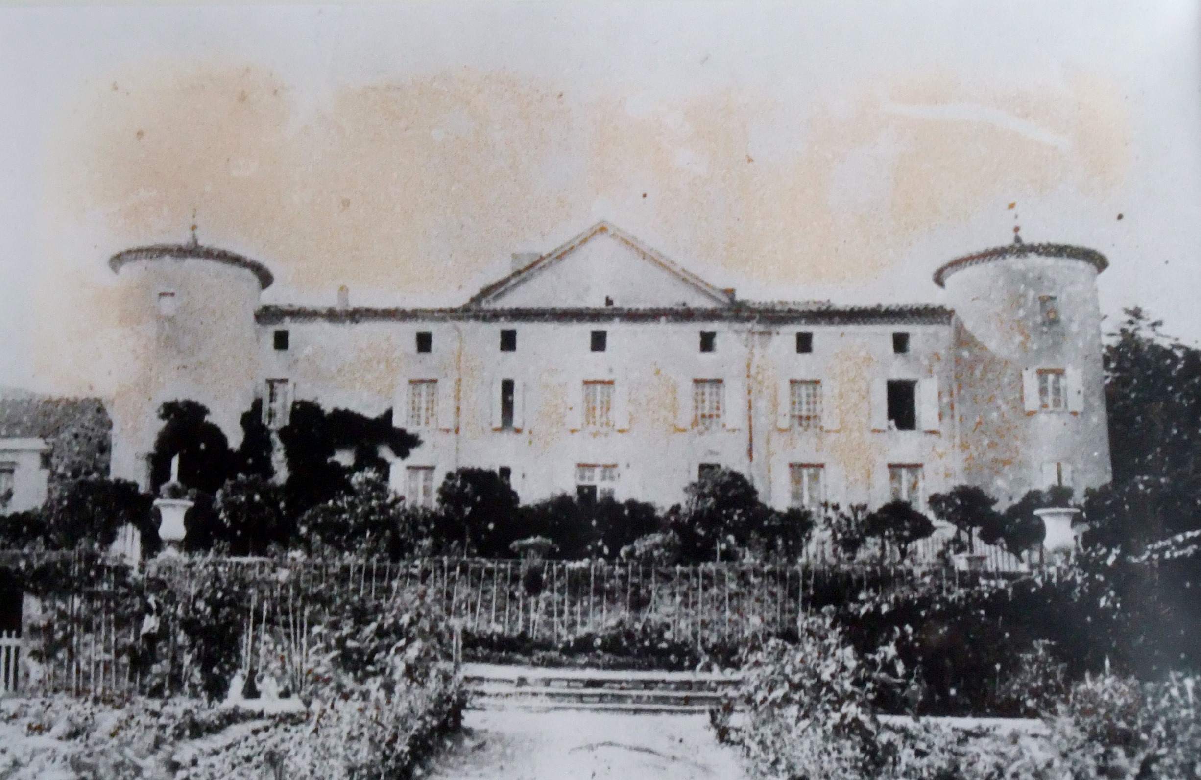 Boulieu château de Mars avant 1898